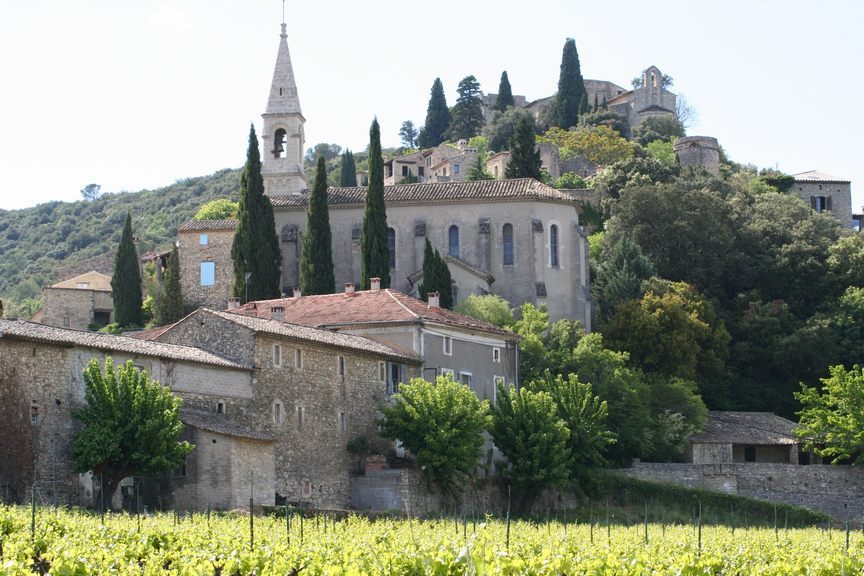 Photo du village La Roque sur Cèze, prise par moi